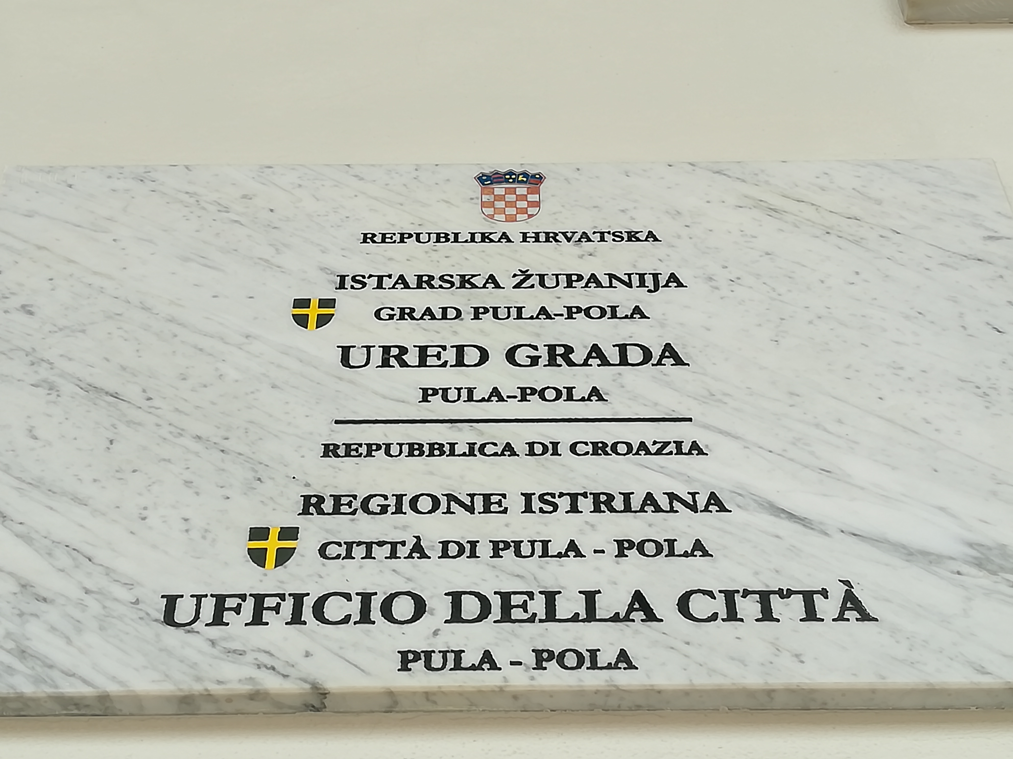 Pola, Croazia.